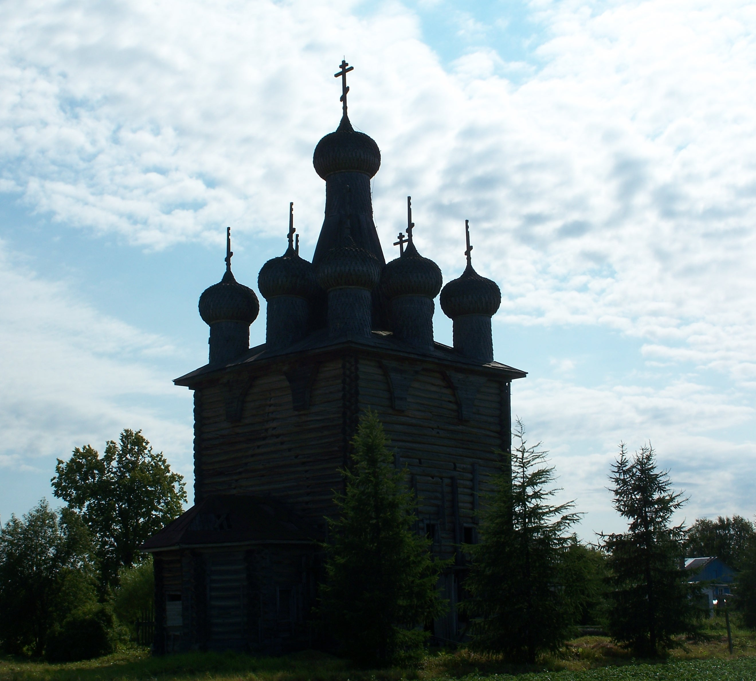 Церковь Сретения Господня (деревянная) (Архангельская область, Северодвинск, село Заостровье (д. Рикасово))